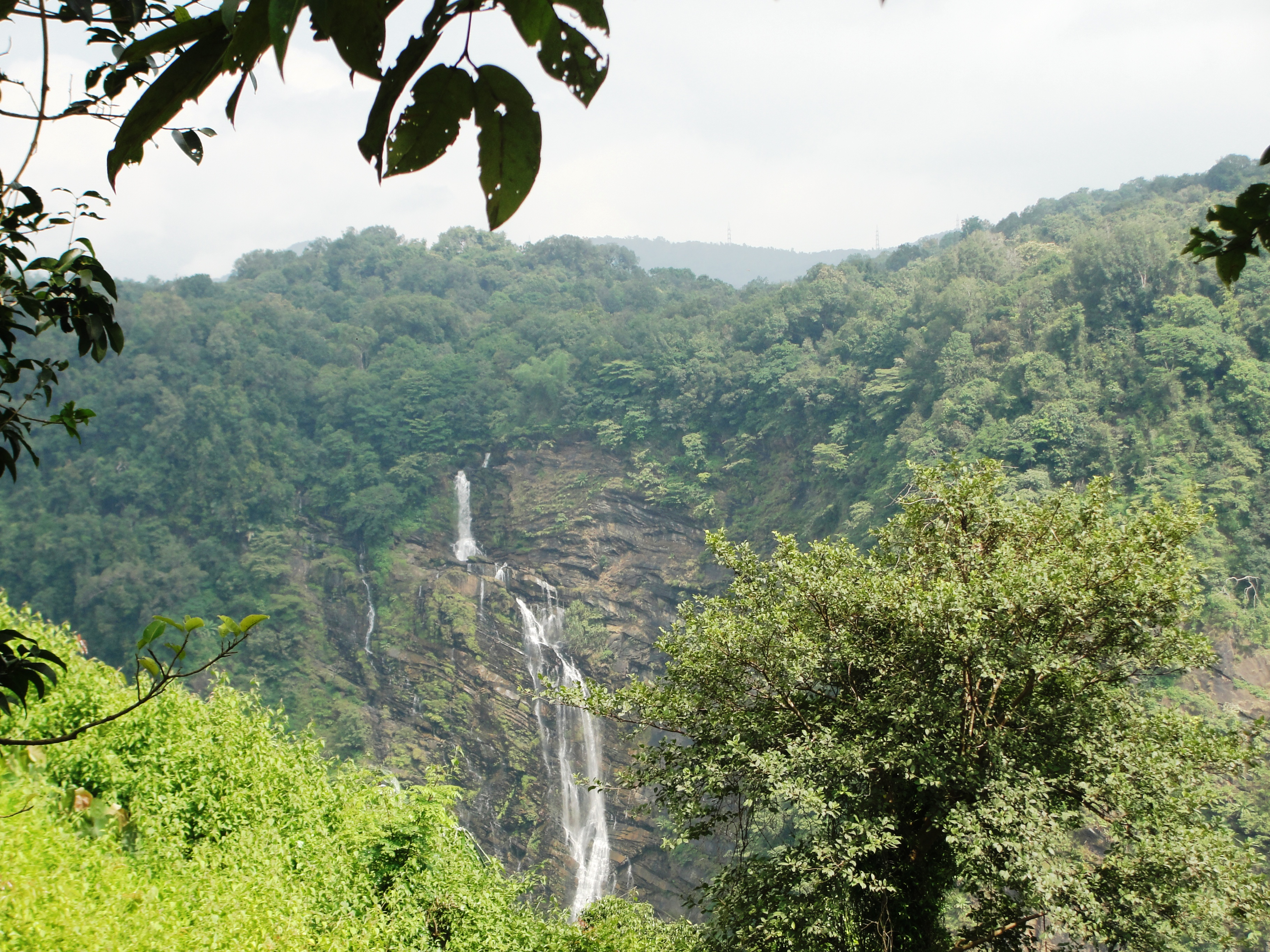 Mavinagundi falls near Jog falls, Karnataka, India